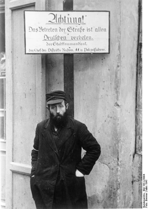 Deutsches Reich, Ghetto Radom, Jude vor Verbotsschild ADB-ZB/Archiv II. Weltkrieg 1939 - 1945 Judenverfolgung durch die faschistischen deutschen Besatzungstruppen in Polen, März 1941 Verbotsschild am Eingang zum Ghetto in einer Stadt im Distrikt Radom. 2881-41 Aufnahmen Brenner [Deutsches Reich, Distrikt Radom.- Verbotsschild ("Achtung! Das Betreten der Straße ist allen Deutschen verboten. Der Stadtkommandant. der Chef des Distrikts Radom. SS u. Polizeiführer")]